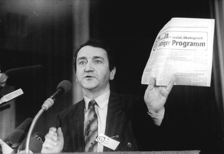 ADN-ZB-Gahlbeck-16.12.89-eng-Leipzig: Gründungsparteitag Demokratischer Aufbruch. Vorsitzender Wolfgang Schnur eröffnete den Gründungsparteitag der sozial und ökologisch ausgerichteten Partei im Kongreßsaal des Brühlzentrums.